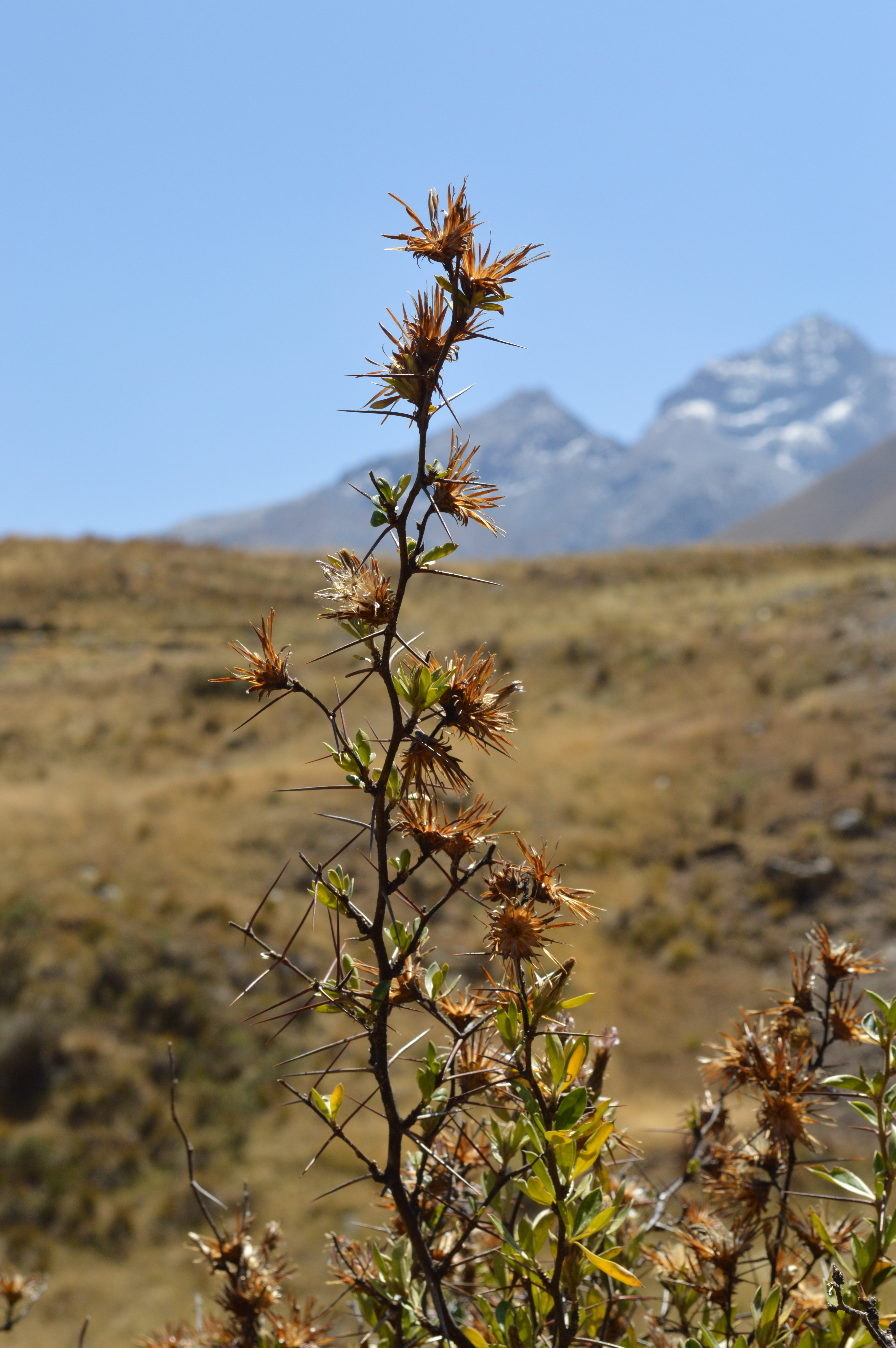 Barnadesia dombeyana en la Cordillera Blanca. Foto tomada en agosto de 2019 en el camino de Pitec a Llupa.